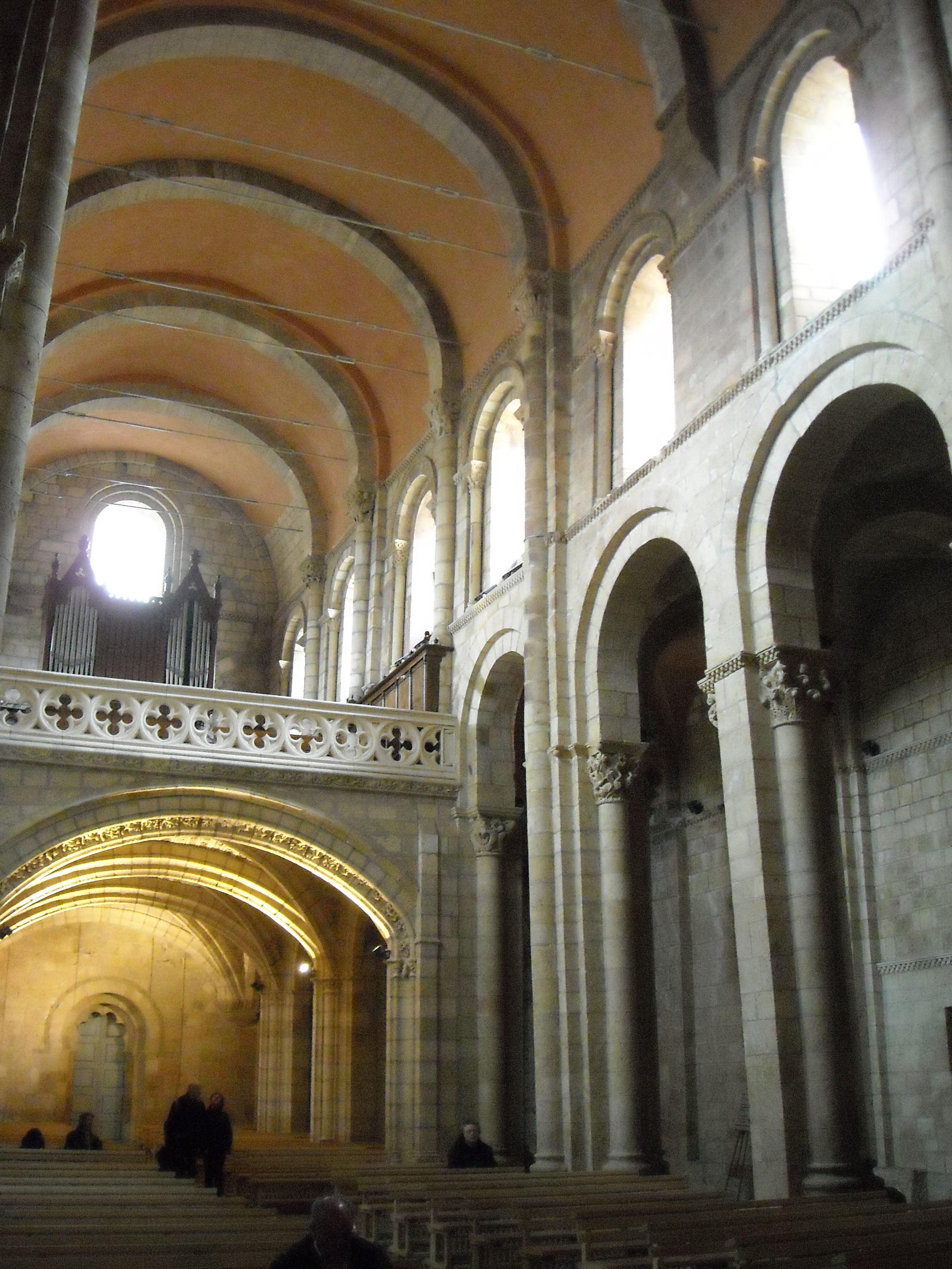 Navata, collegiata di Sant'Isidoro, León, Spagna